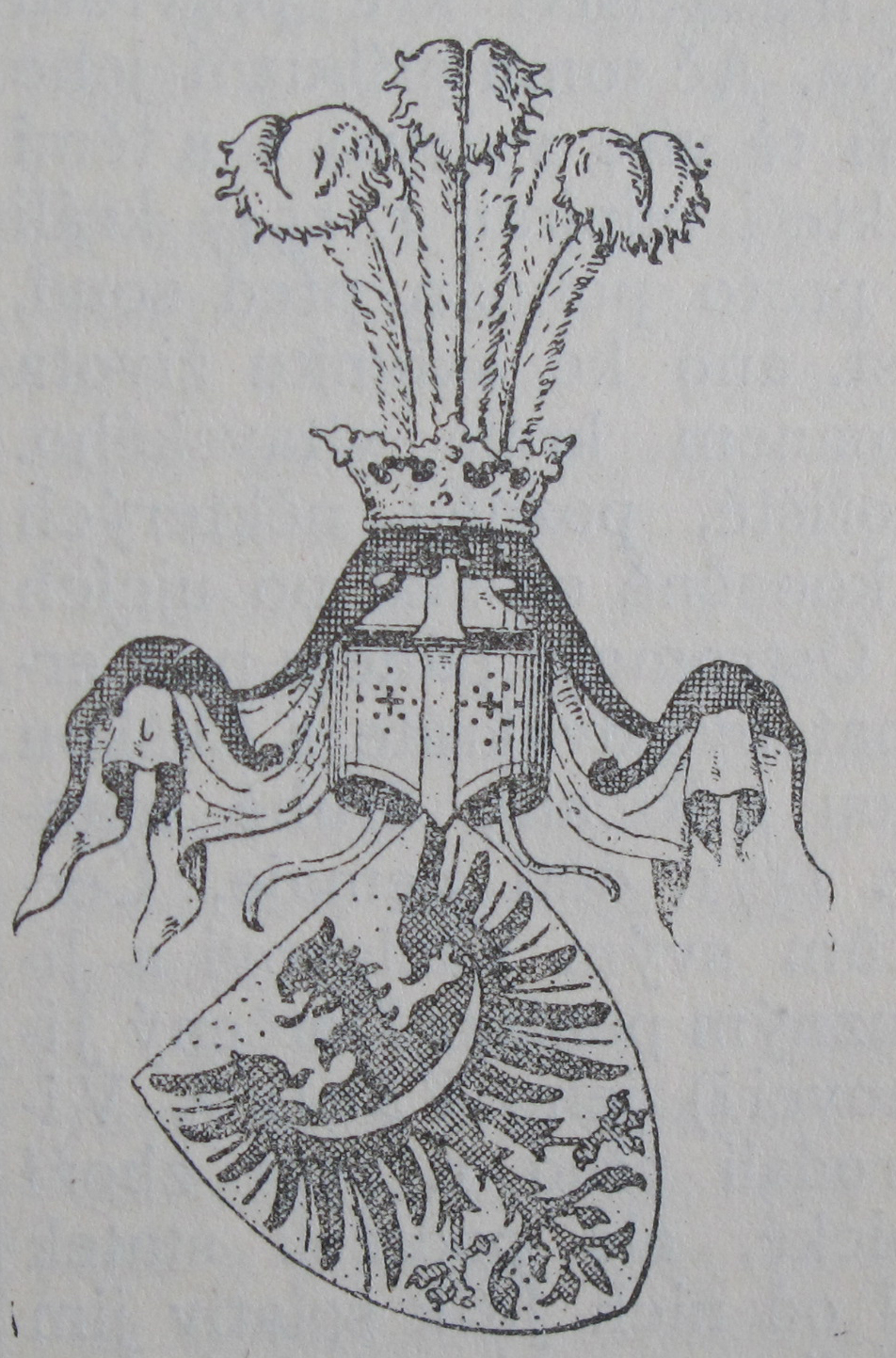 Původní popisek: Č. 60. Znak pánů z Adlaru.